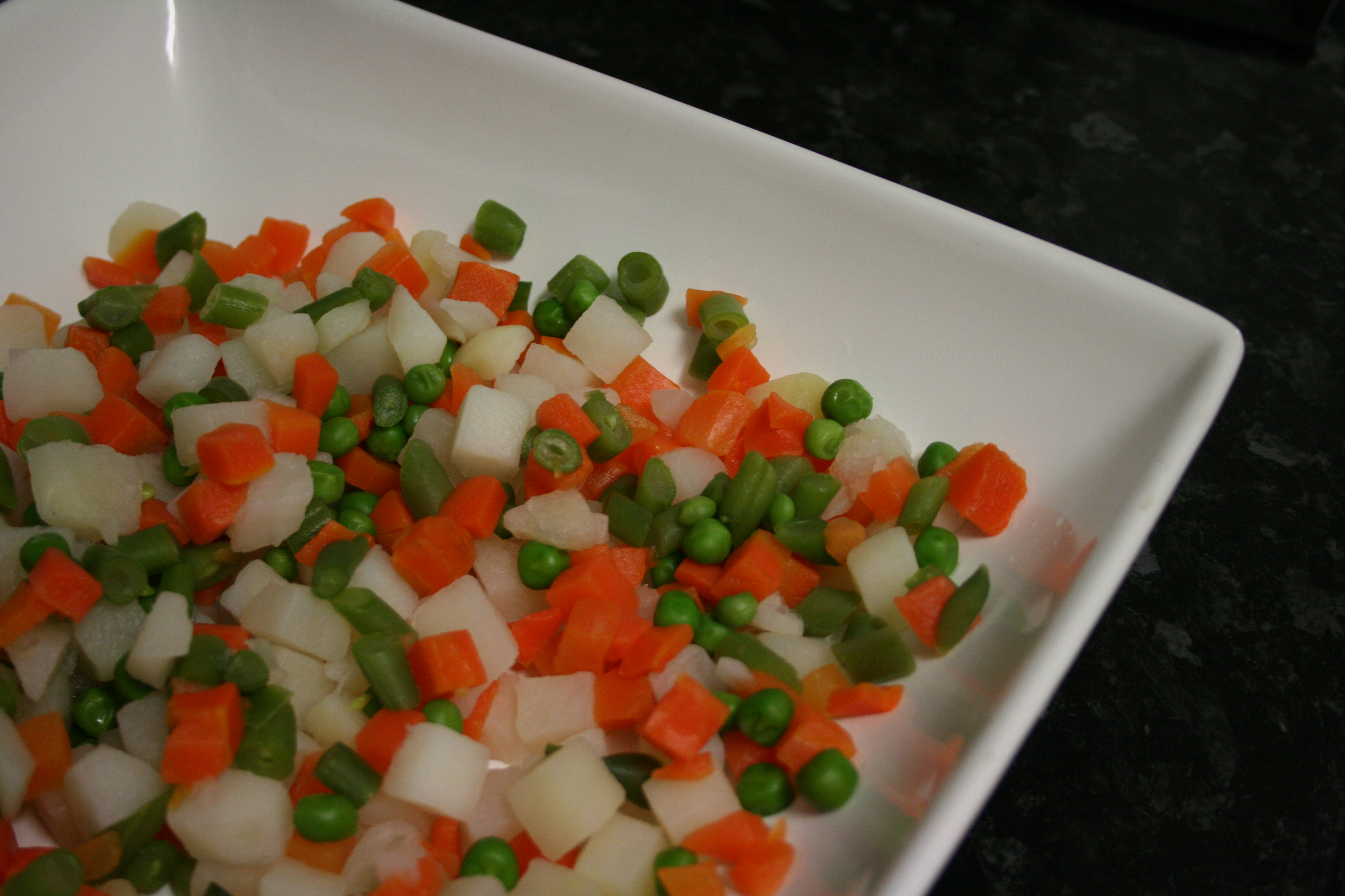 Primer paso de la ensaladilla rusa